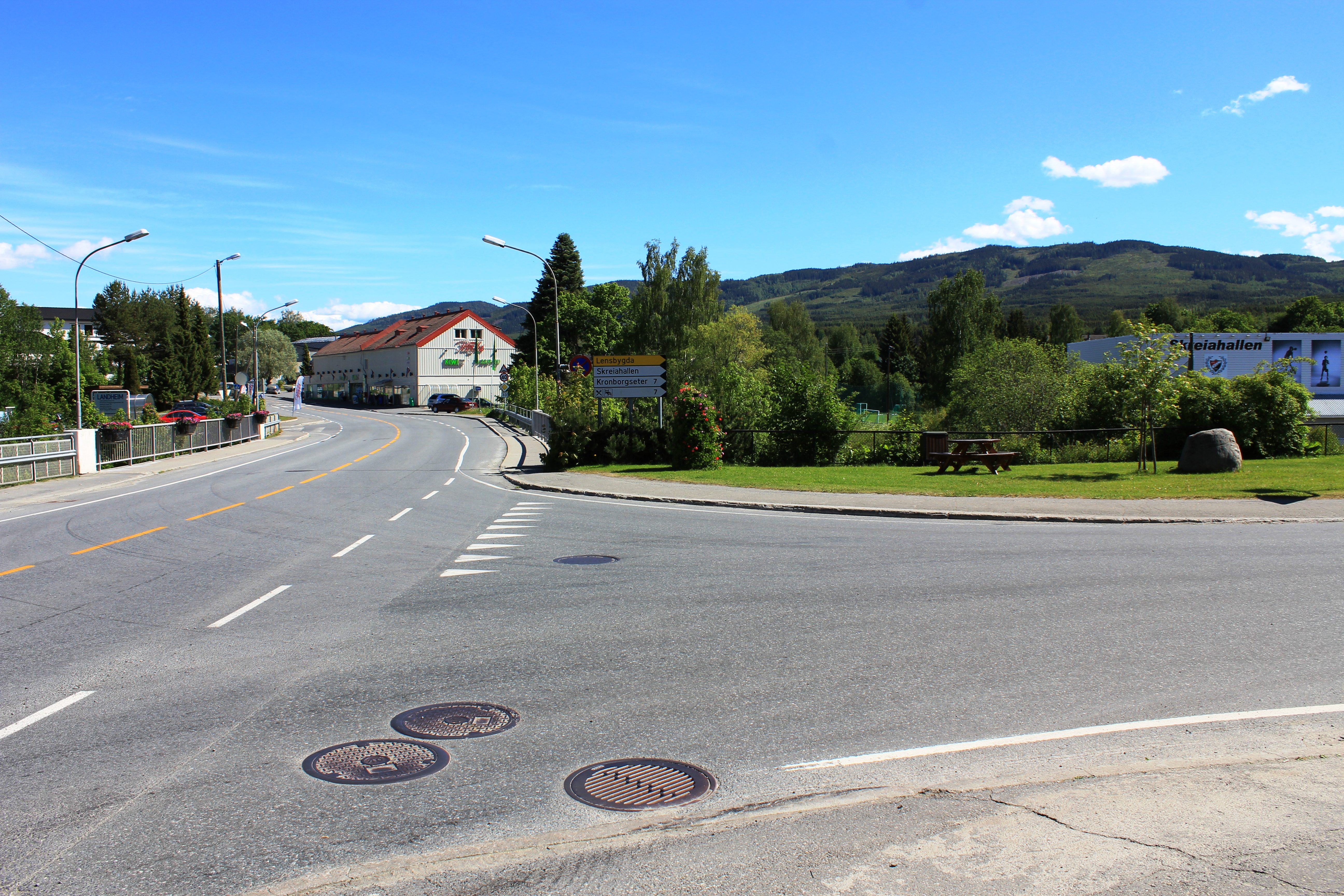 SKREIA KRYSS